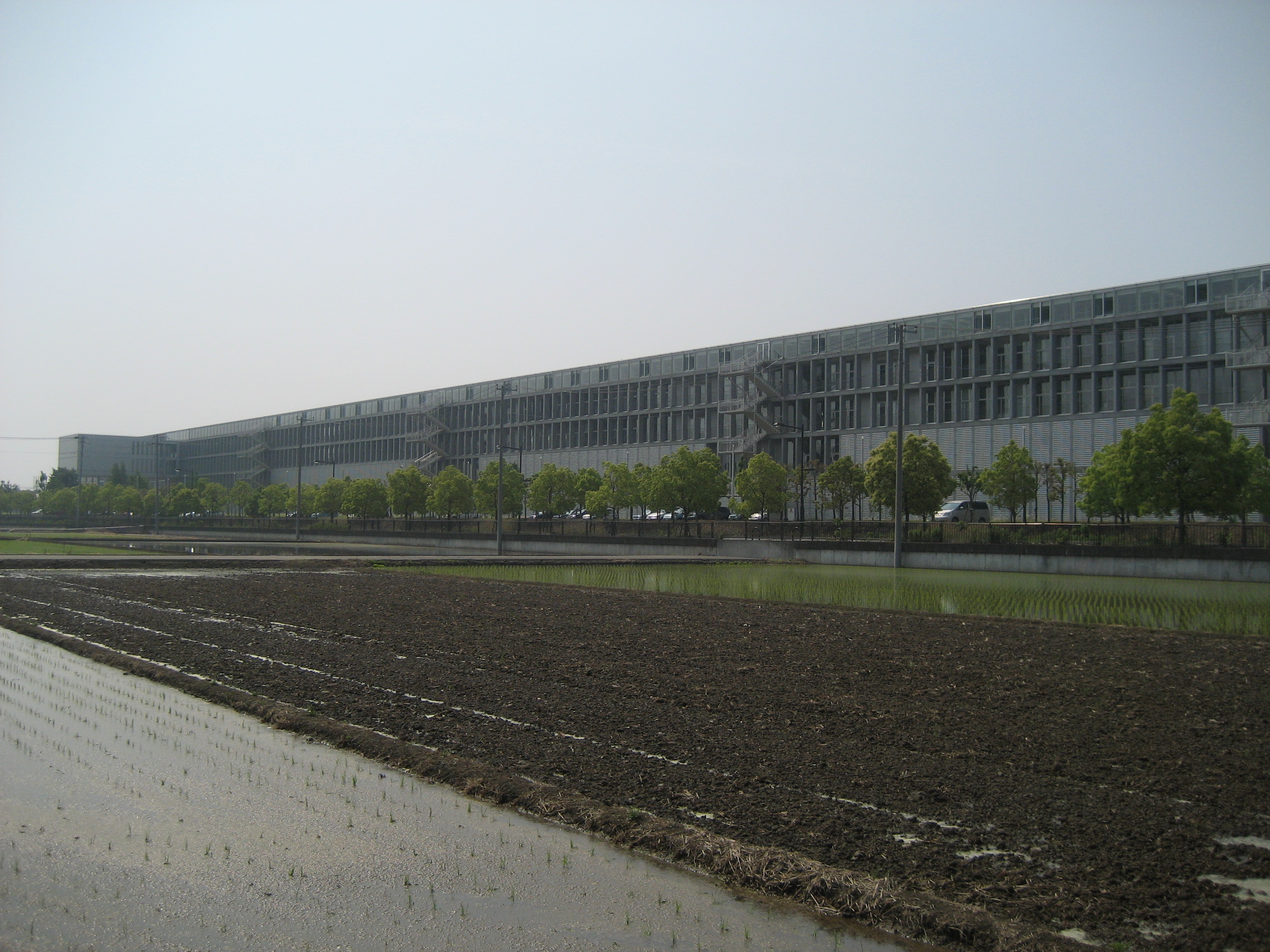 埼玉県立大学